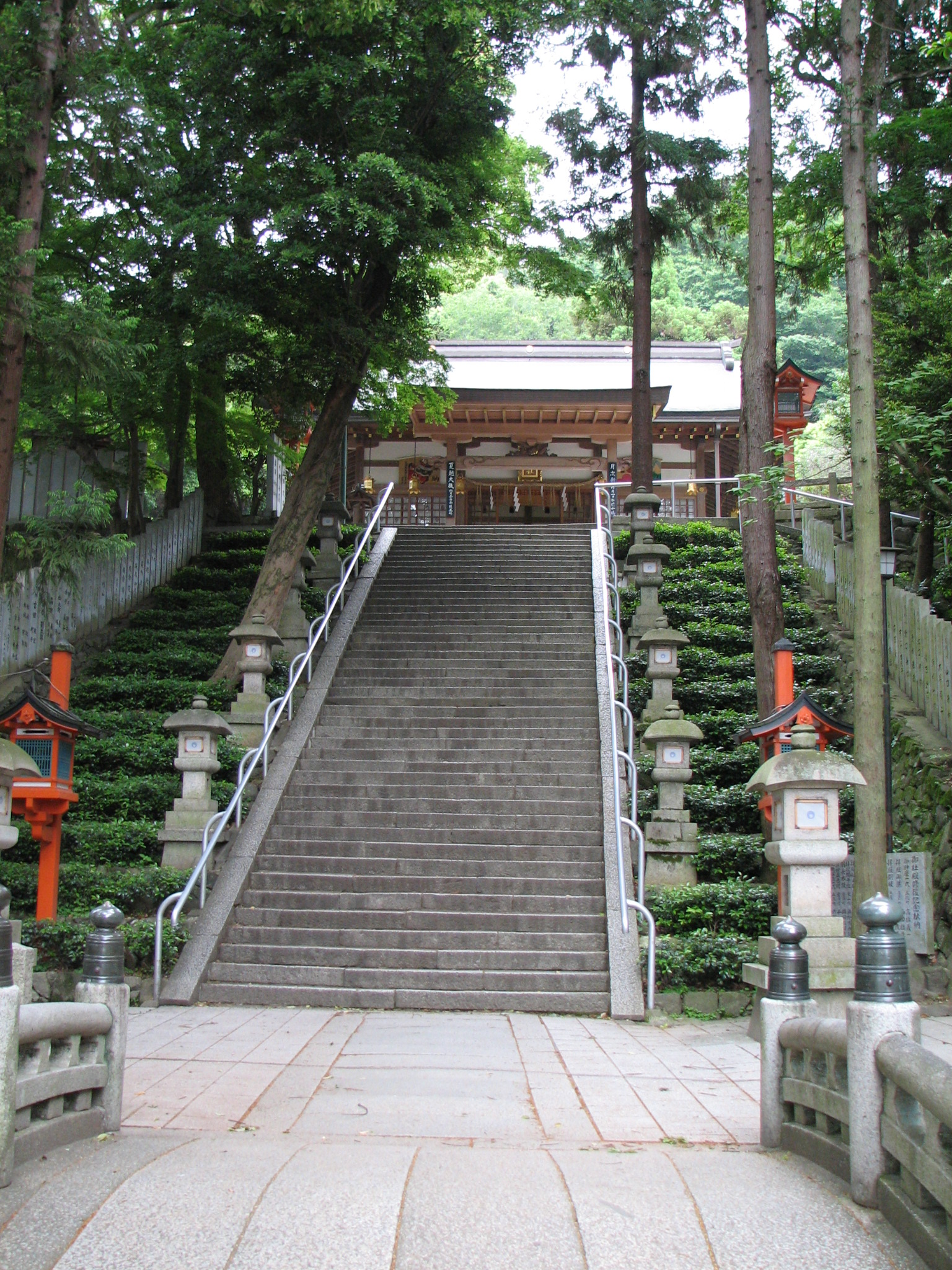 Hiraoka Shrine, Higashi-Ōsaka, Ōsaka, Japan 枚岡神社（大阪府東大阪市）